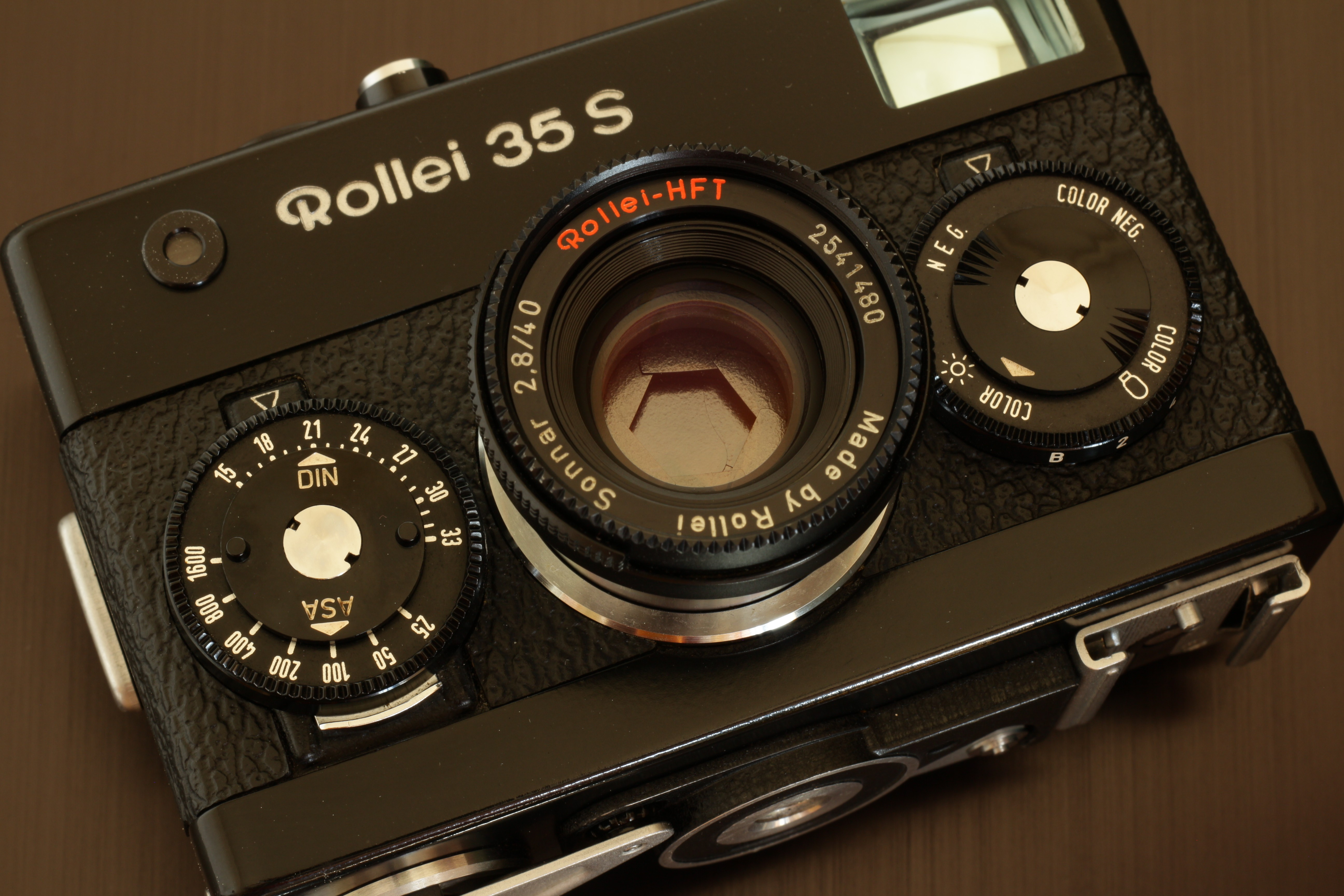 Versenkbares Objektiv »Sonnar 2,8/40 Rollei-HFT« der Kleinbildkamera »Rollei 35 S«